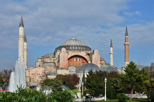 Aya Sofya